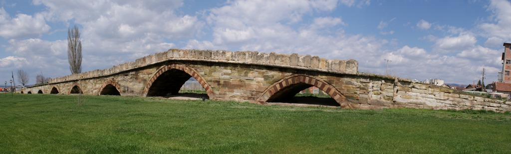 Ura mesjetare me nëntë harqe